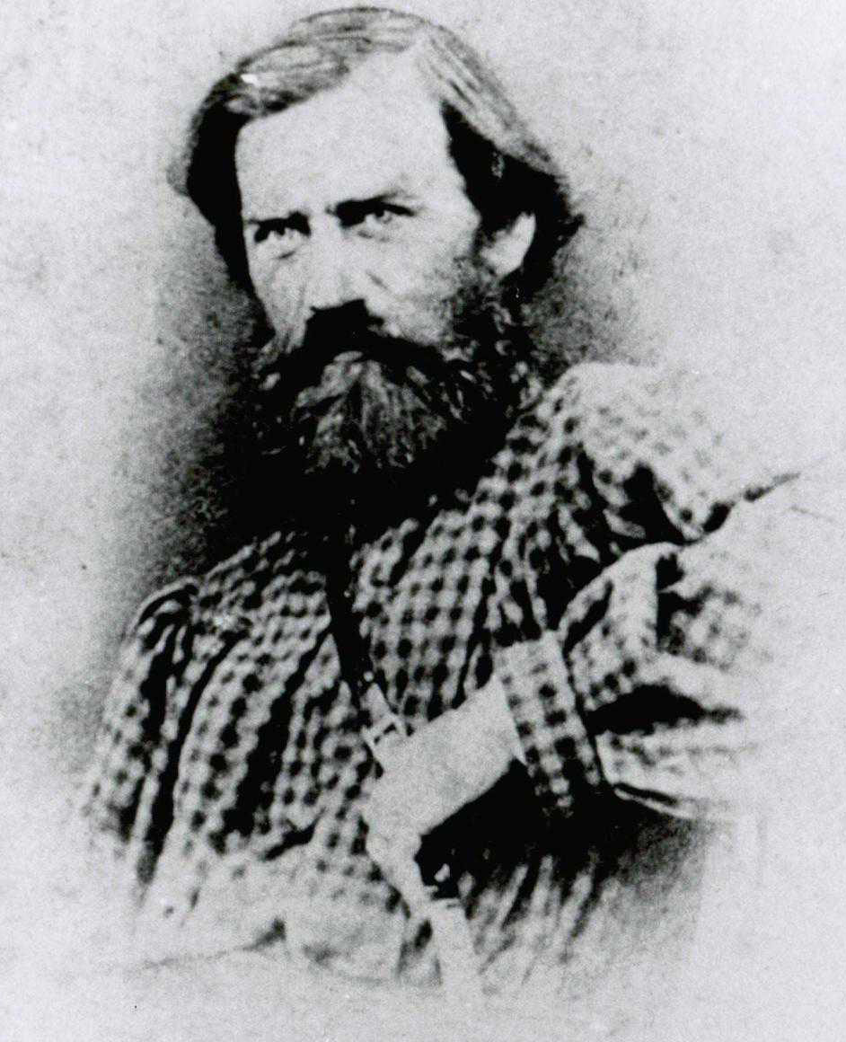 Левашов, Валерий Николаевич 1822 года рождения